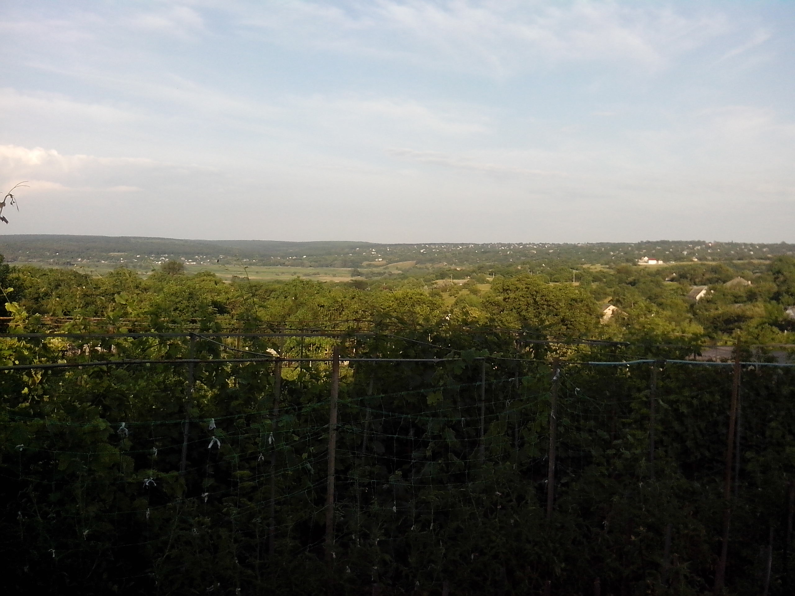 Пейзажі Караухівки